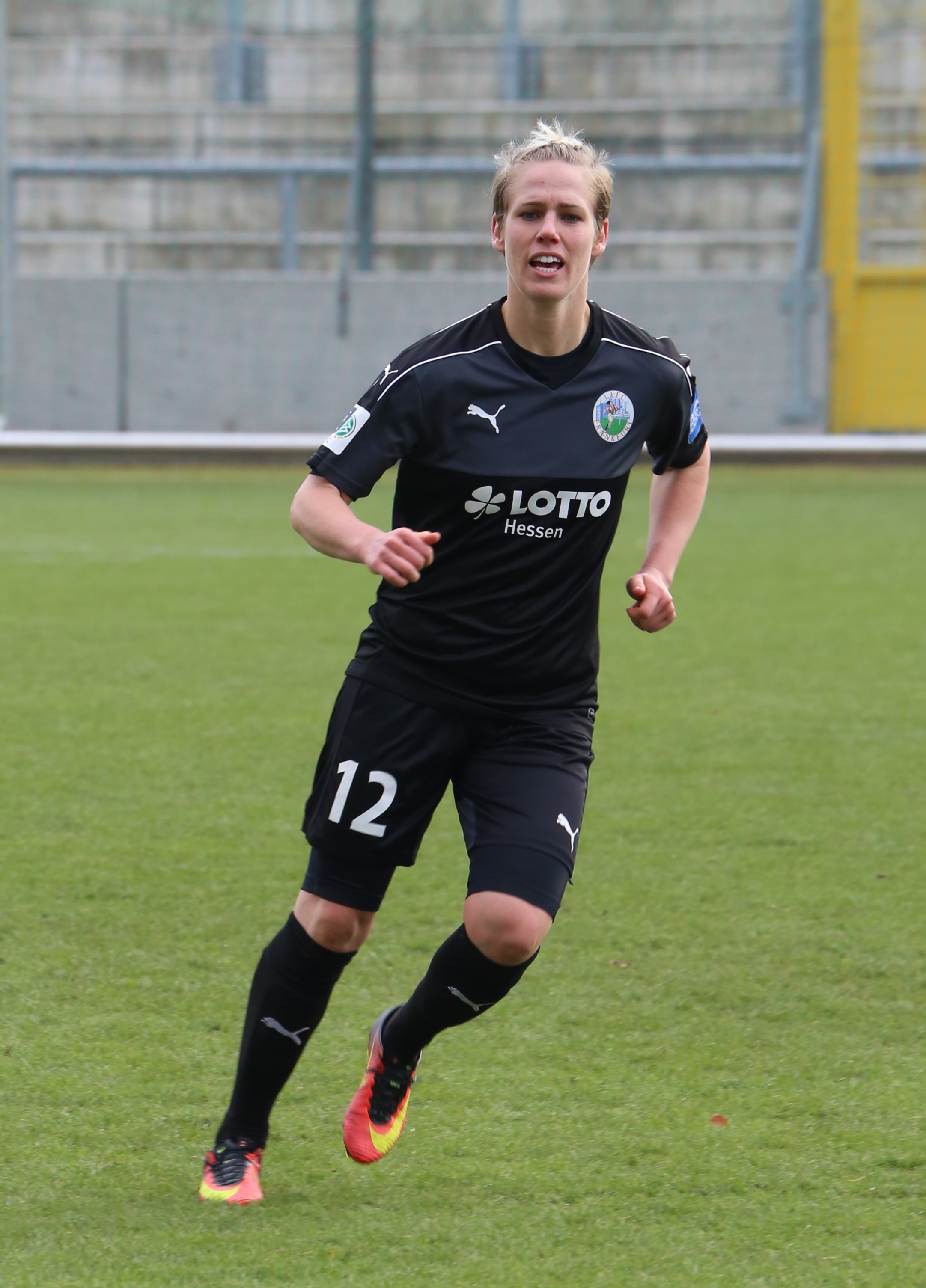 Sophie Schmidt (1. FFC Frankfurt) beim Frauen-Bundesliga-Spiel FC Bayern München gegen 1. FFC Frankfurt am 13. November 2016 im Stadion an der Grünwalder Straße, München (Ergebnis war 1:0).